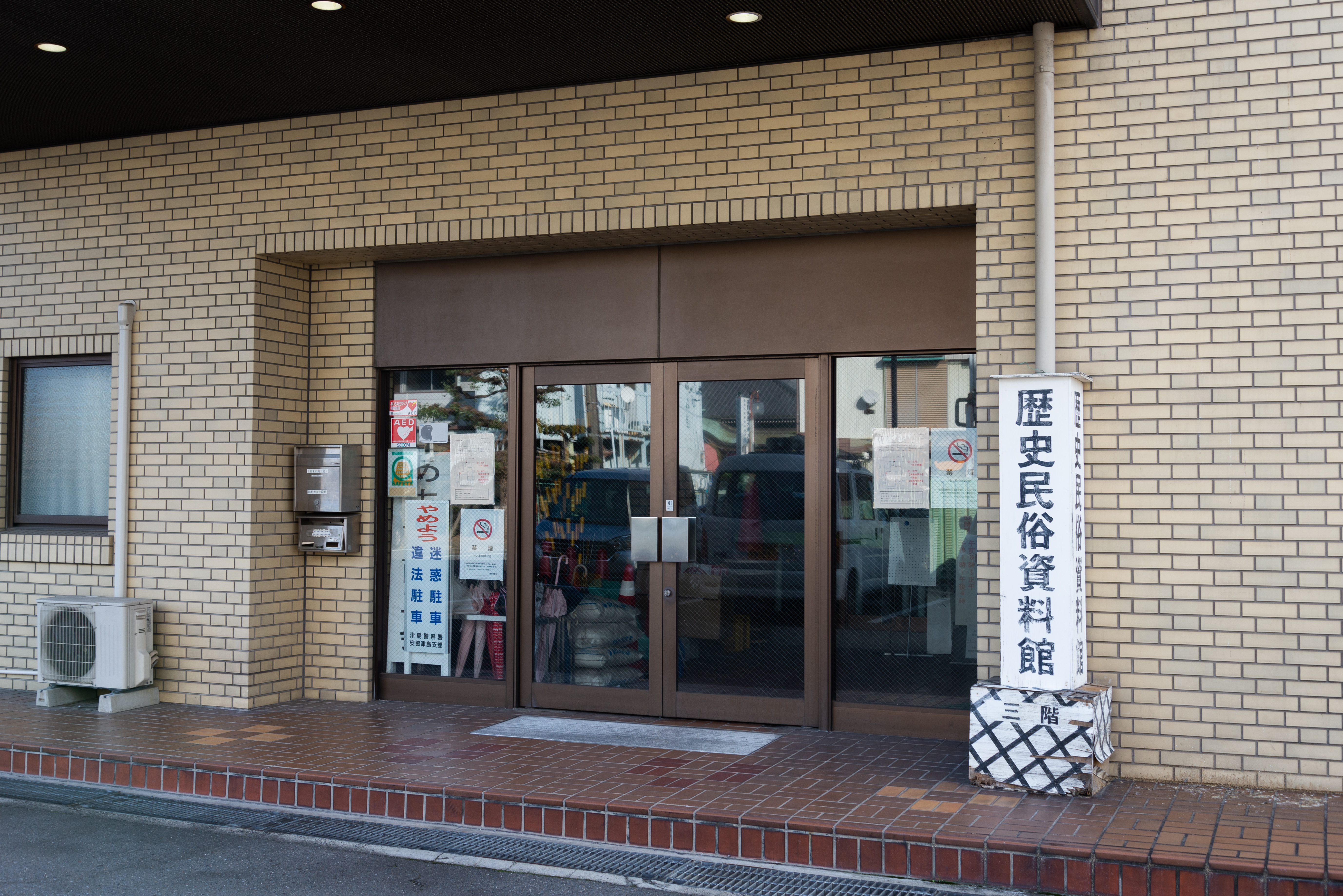 愛知県あま市にある甚目寺産業会館の側面入り口